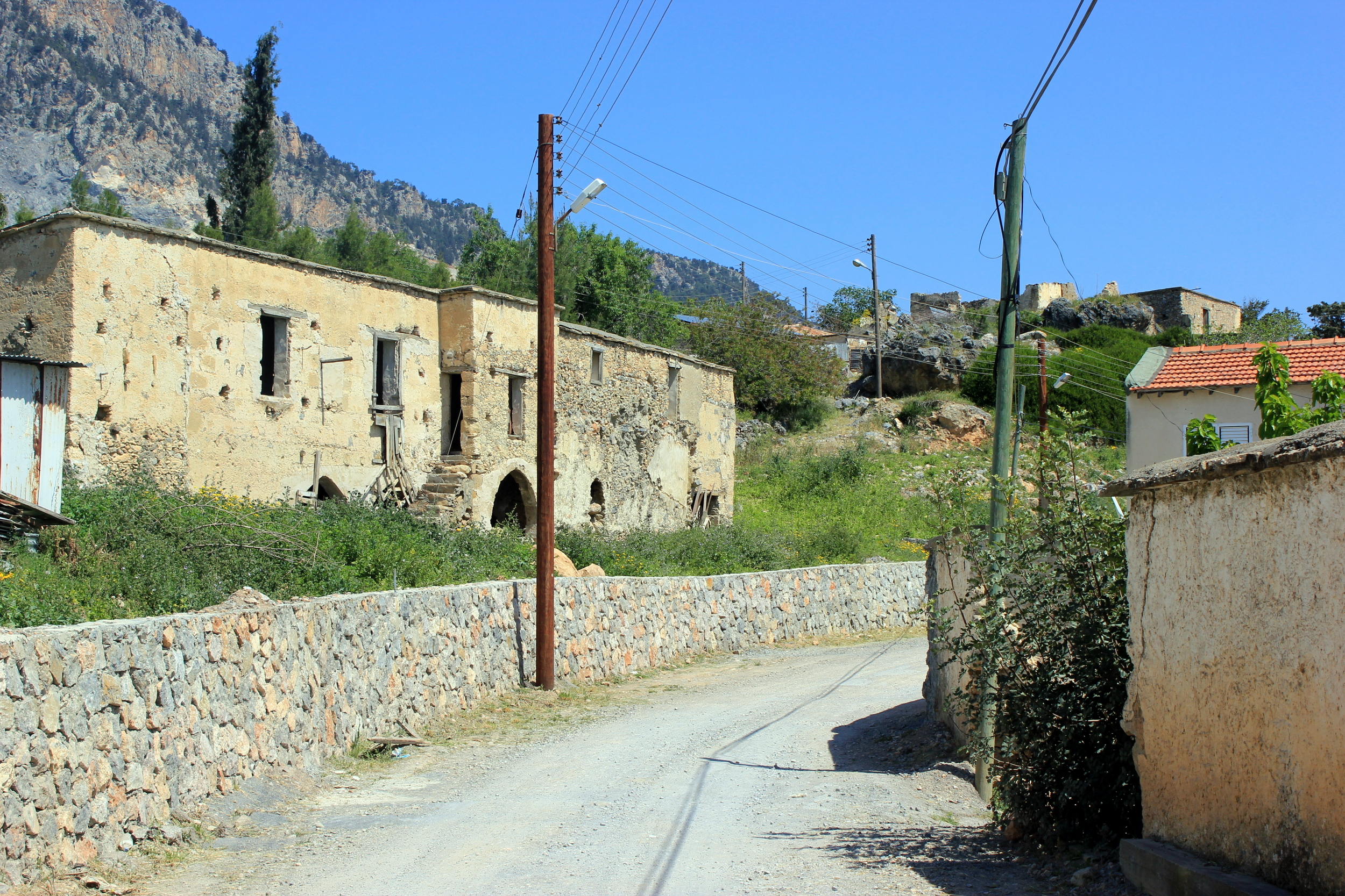 In Sysklipos/Akçiçek, Nordzypern.